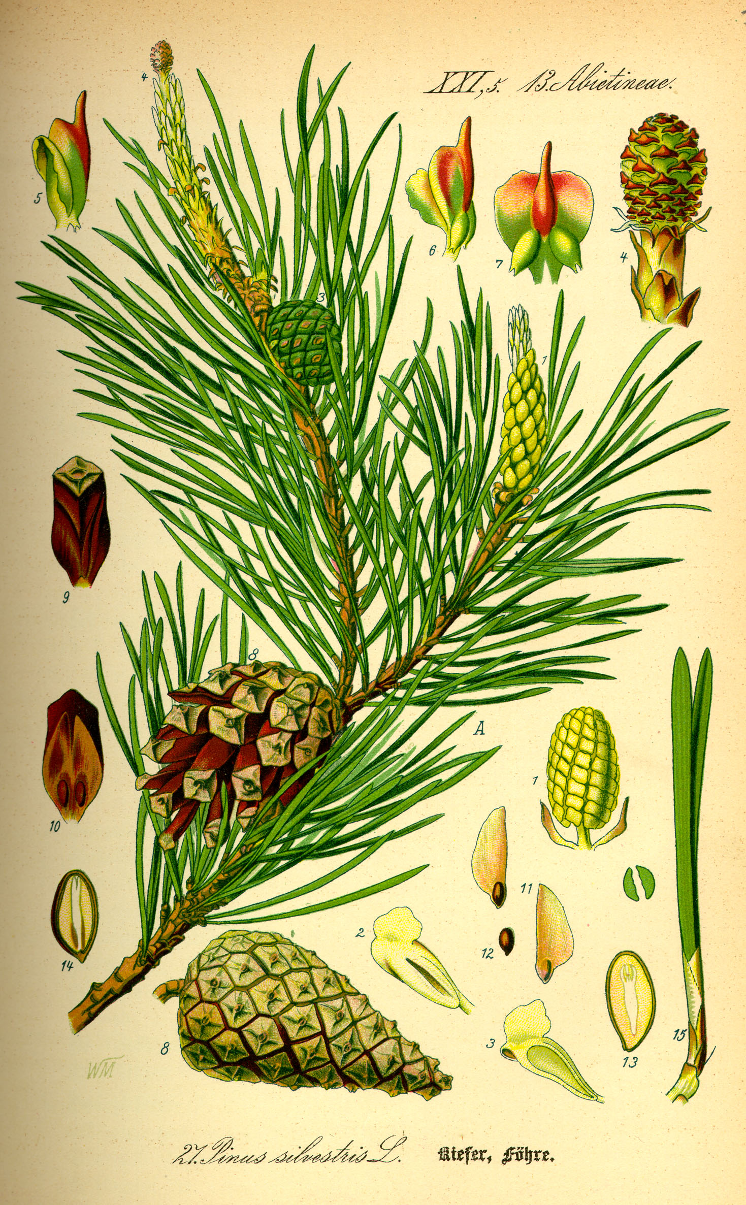 Pinus sylvestris Original book source Prof. Dr. Otto Wilhelm Thomé, Flora von Deutschland, Österreich und der Schweiz. 1885, Gera, Germany. Permission granted to use under GFDL by Kurt Stueber